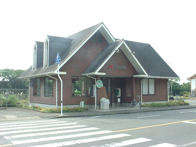 日豊本線 川南駅 2005年8月19日 Bakkai撮影